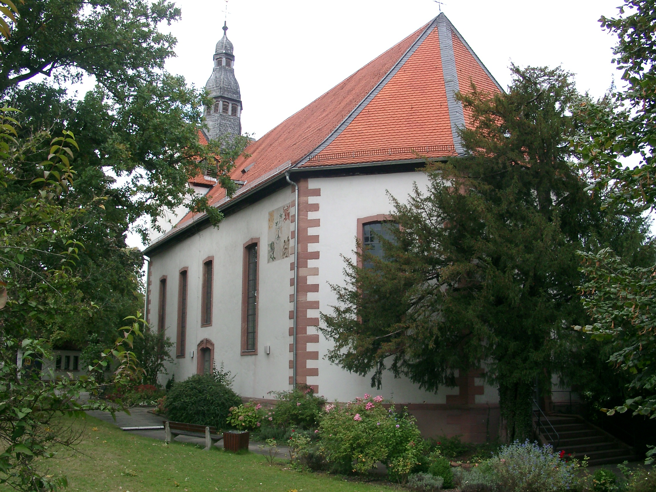 Dietzenbach, Evangelische Christuskirche. Das Gebäude ist als Kulturdenkmal eingetragen. Die beiden Eiben, die die Kirchtreppe säumen, sind zusammen als ein Naturdenkmal geschützt.